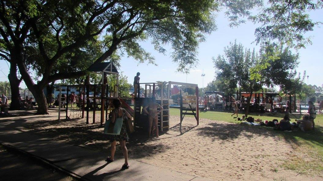 Sector Infatil en el Complejo Polideportivo - Argentino de San Carlos